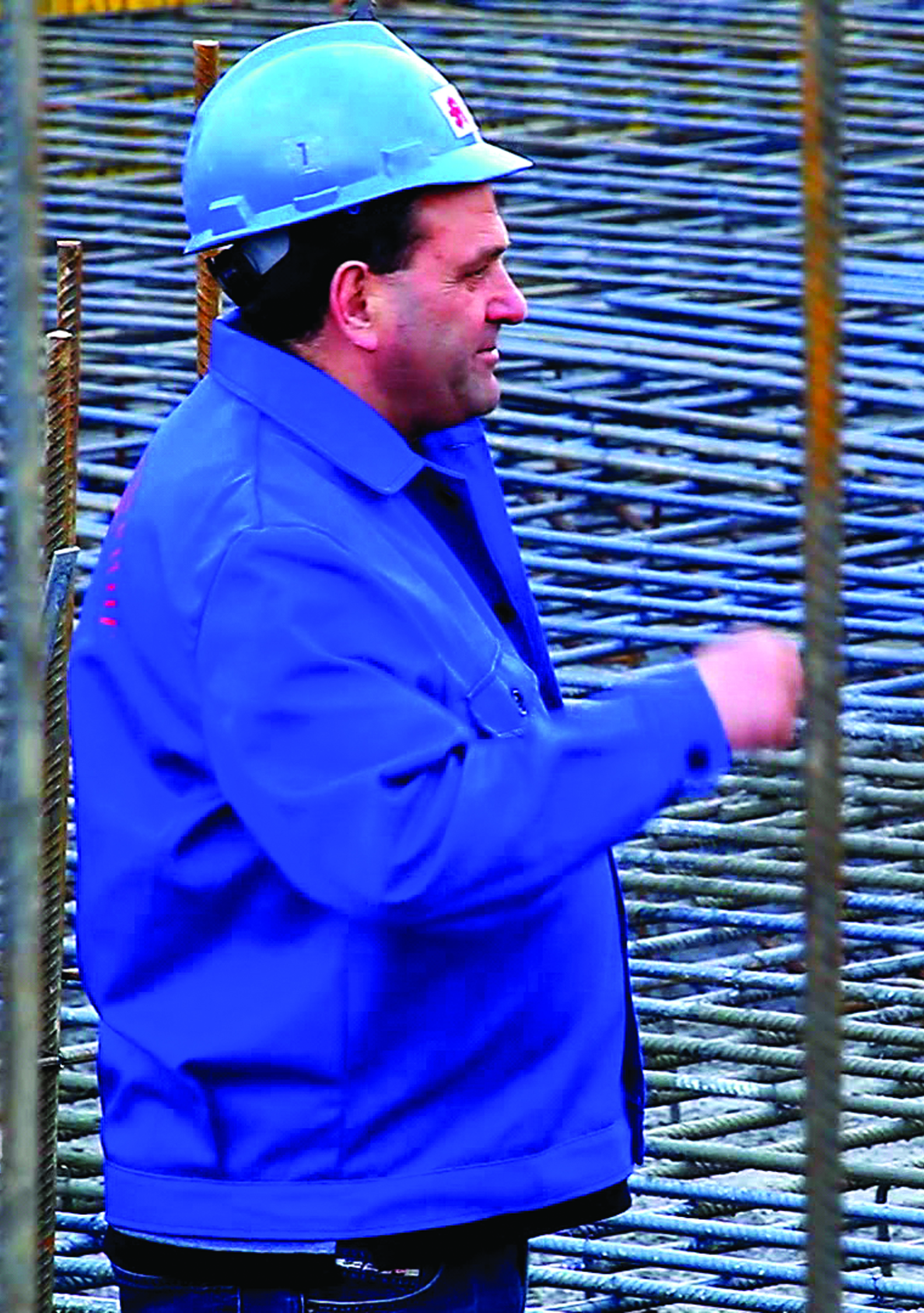 Чифлиганец со шлем на главата на железна арматура на градилиште